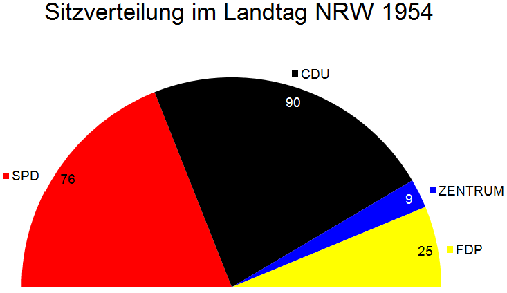 Sitzverteilung im Landtag Nordrhein-Westfalen nach der Landtagswahl in Nordrhein-Westfalen 1954